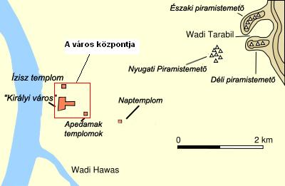 Meroe magyarított térképe